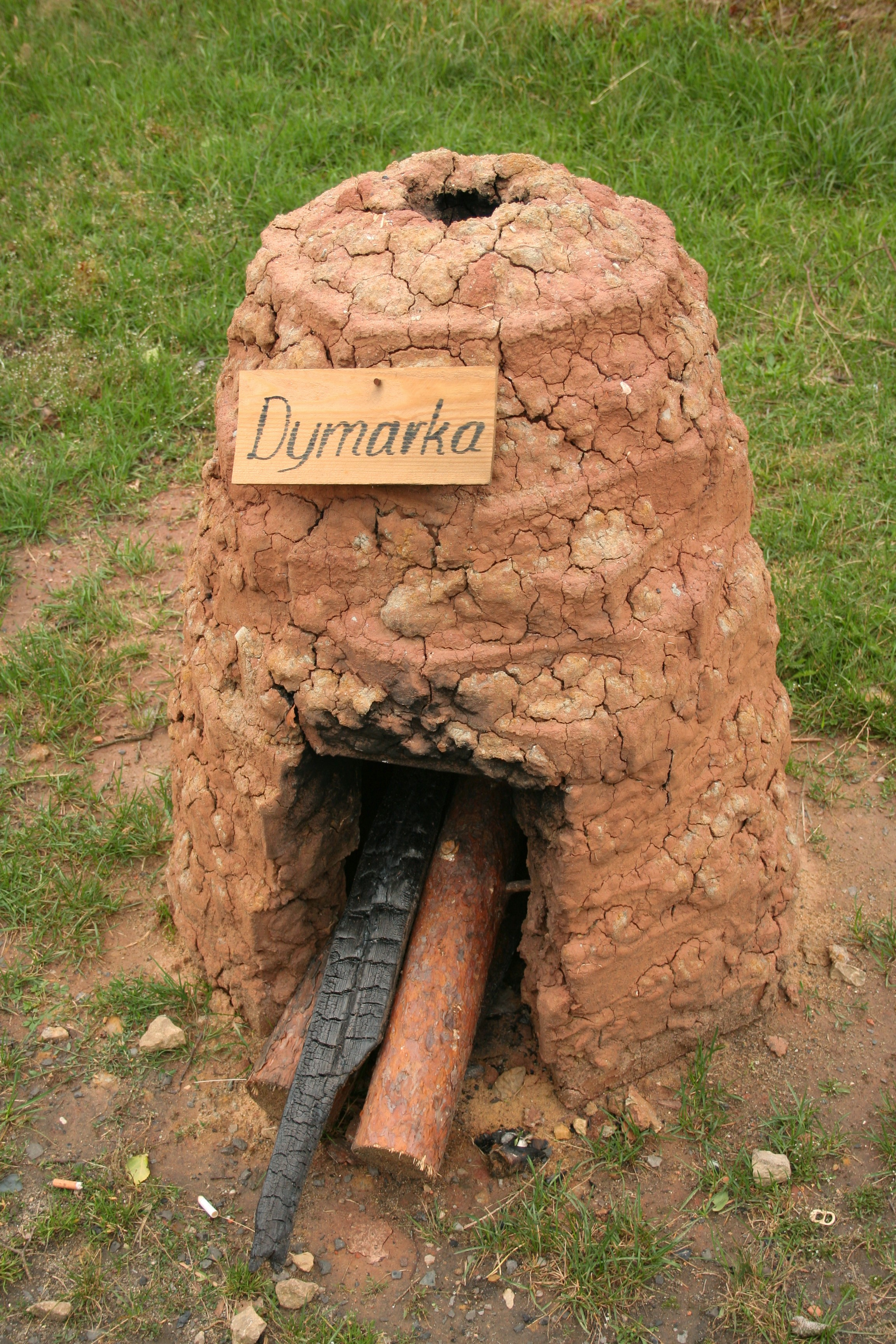 Dymarka w Bruśku, powiat lubliniecki